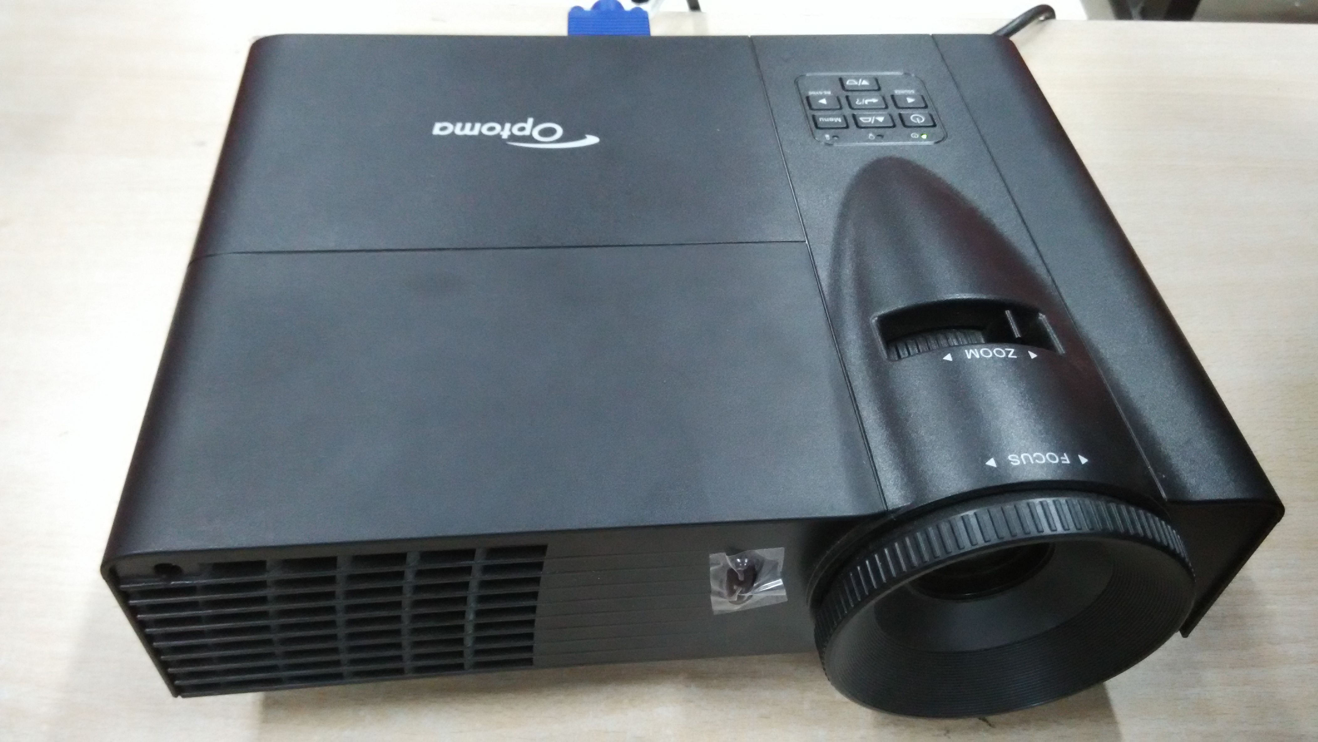 படத்தரவேற்றம்: தமிழ்ப்பரிதி மாரி